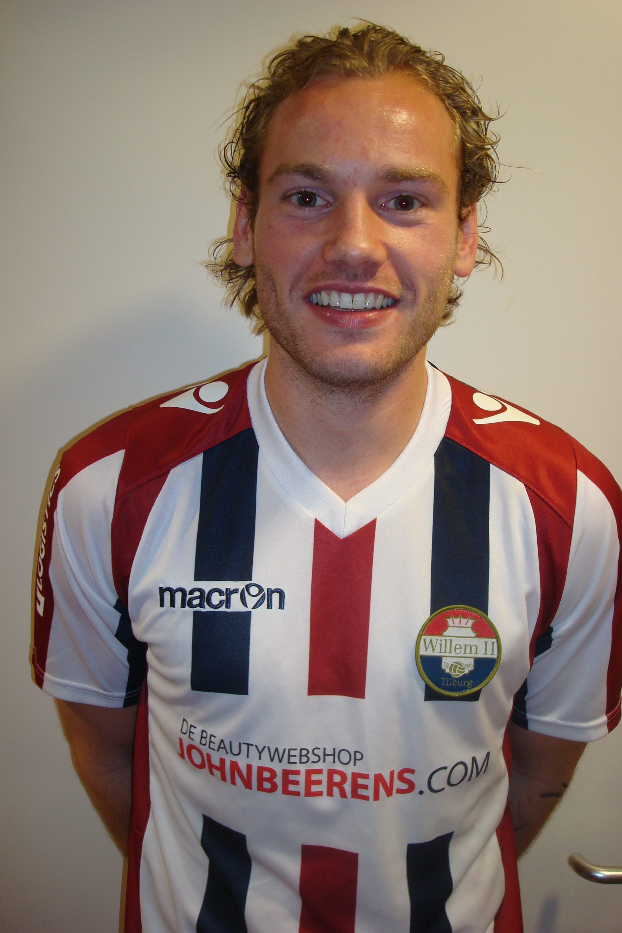 Niek Vossebelt in het shirt van Willem II seizoen 2013/2014